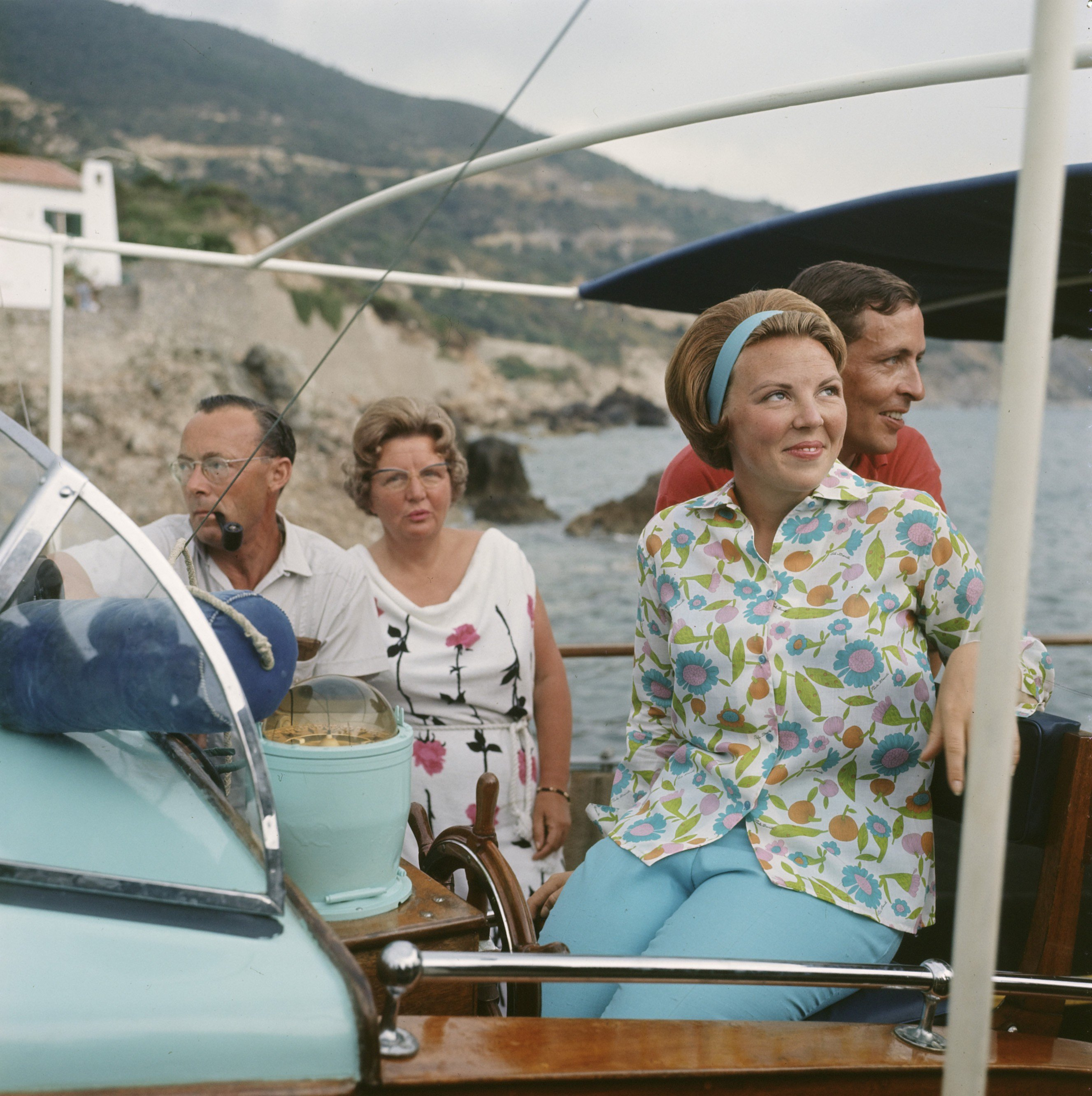 Collectie / Archief : Fotocollectie Anefo Reportage / Serie : De koninklijke familie is op vakantie in Porto Ercole, Italië Beschrijving : De koninklijke familie op de zeilboot Datum : 26 juli 1965 Locatie : Italië, Porto Ercole Trefwoorden : koninginnen, prinsen, prinsessen Persoonsnaam : Beatrix, prinses, Bernhard, prins, Claus, prins, Juliana, koningin Instellingsnaam : Villa l'Elefante Felice Fotograaf : Fotograaf Onbekend / Anefo Auteursrechthebbende : Nationaal Archief Materiaalsoort : Dia (kleur) Nummer archiefinventaris : bekijk toegang 2.24.01.07 Bestanddeelnummer : 254-7158